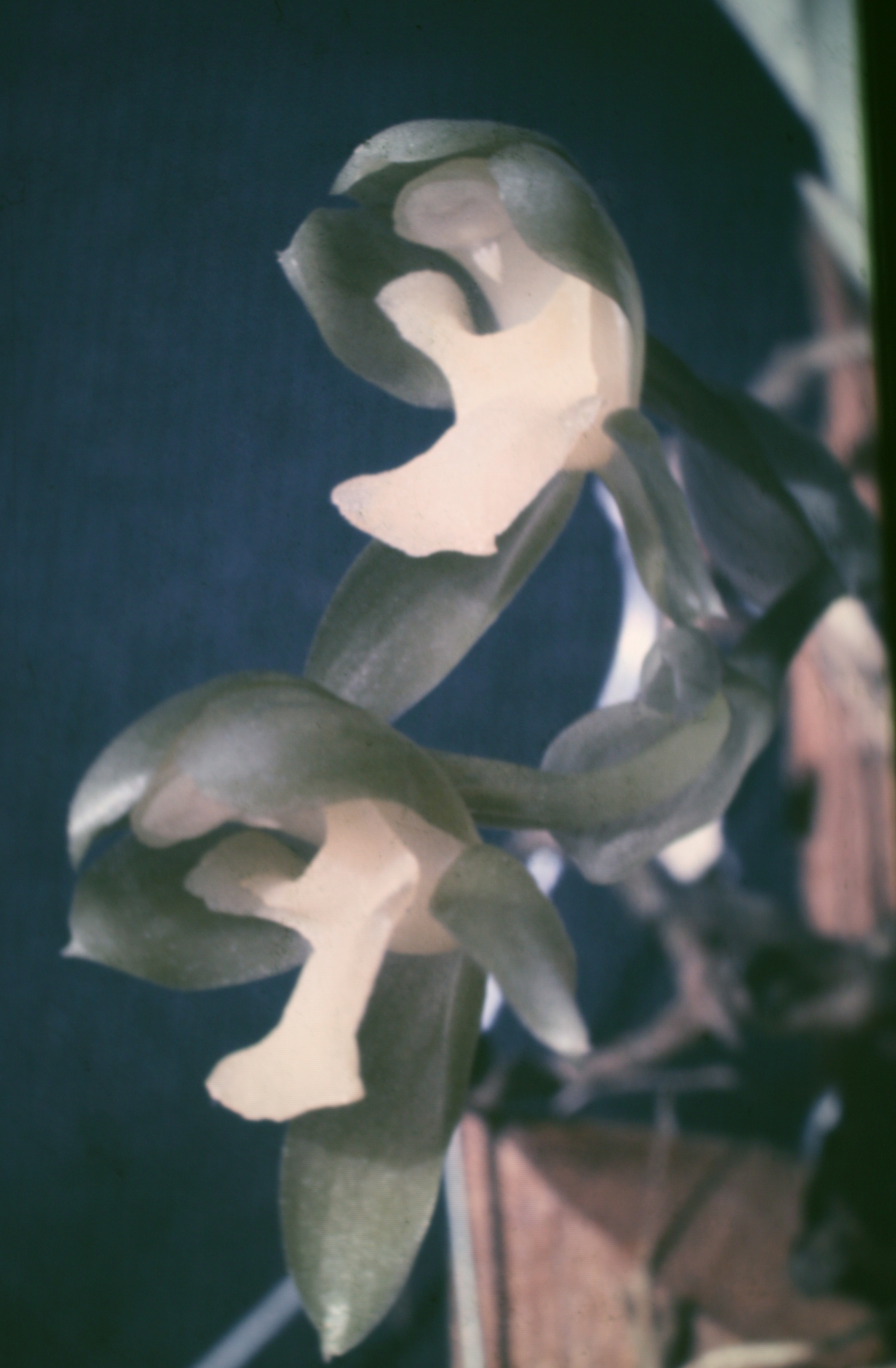 Batemannia armillata , Suriname.